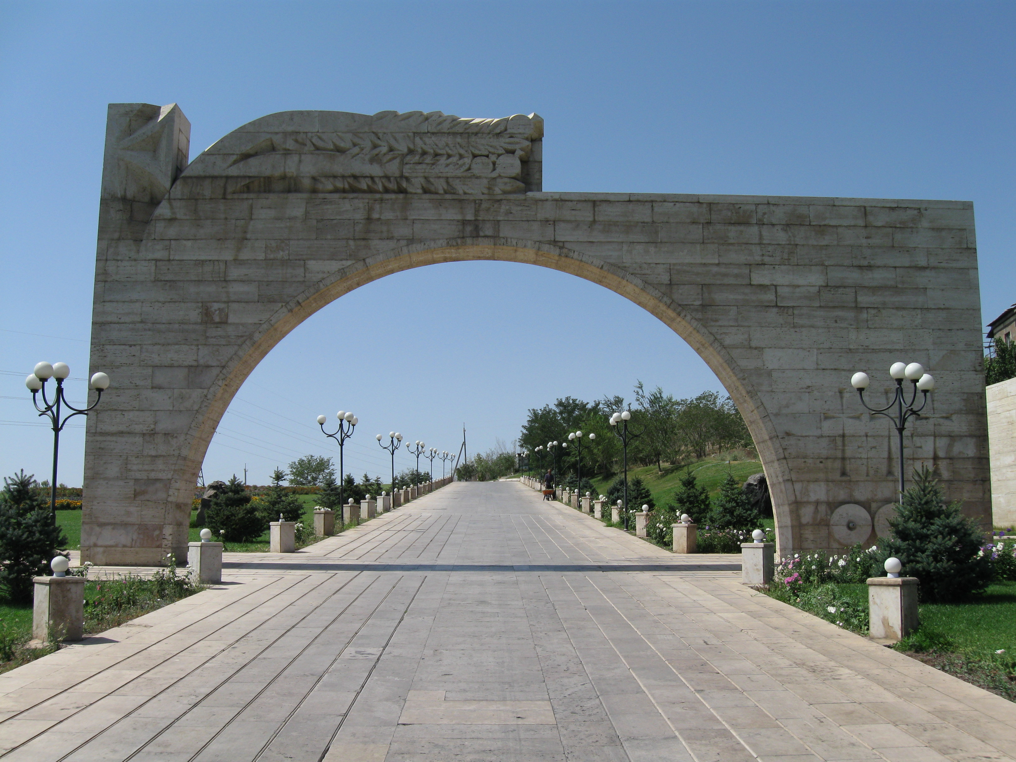 Եռաբլուր պանթեոնի մուտքը